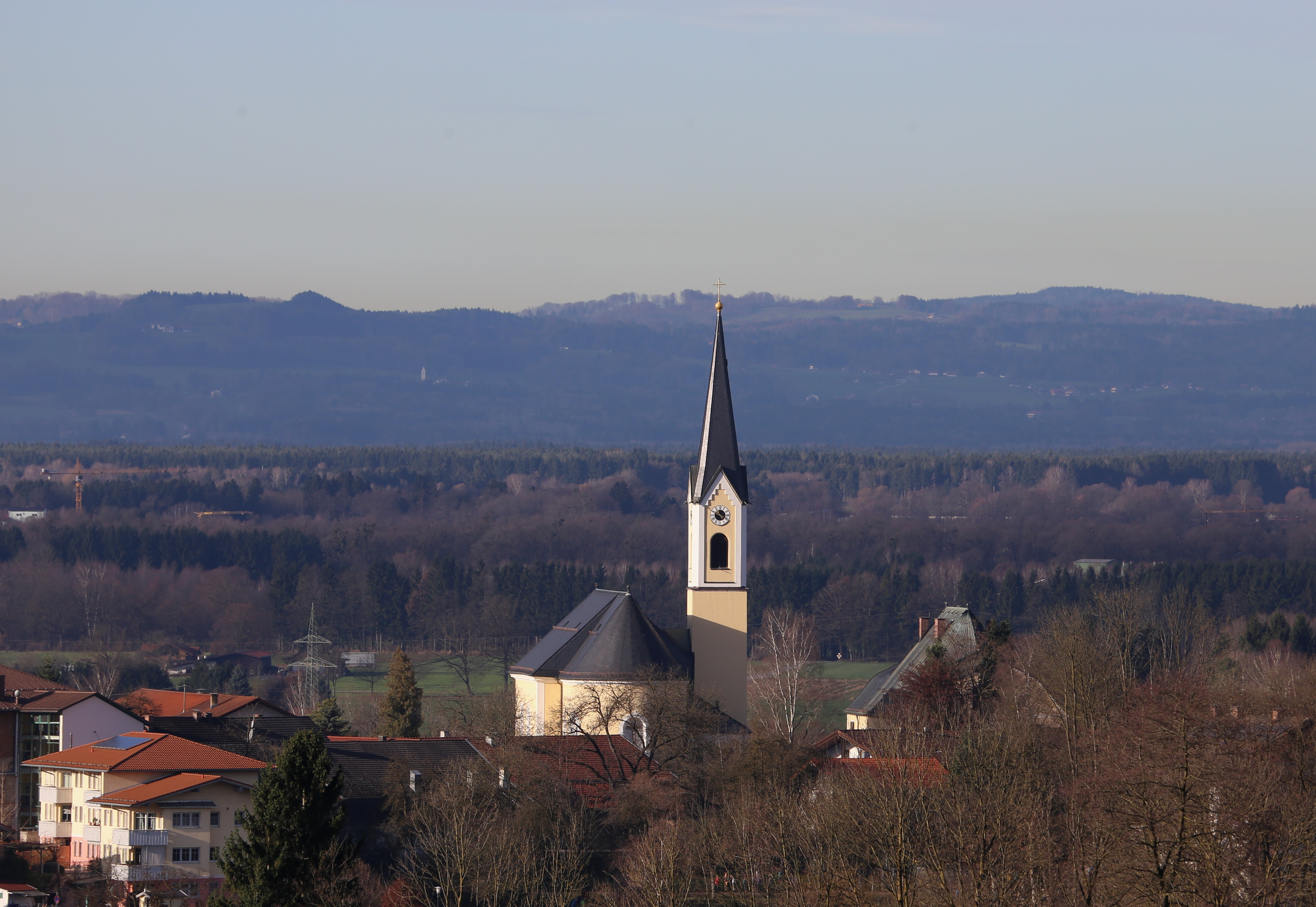 St.-Jakobus-Platz 1, Rohrdorf; Kath. Pfarrkirche St. Jakobus d.Ä., Saalbau mit Satteldach und Nordturm mit Spitzhelm, Turmunterteil spätgotisch, barocker Neubau 1769-73 von Leonhard Matthäus Gießl, 1854-55 Turmoberbau, 1864 neuromanische Vorhalle; mit Ausstattung; Friedhofsummauerung des 17./18. Jh.